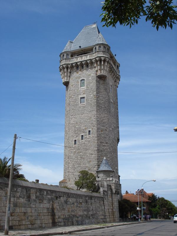 Torre Tanque de Obras Sanitarias de la Nación